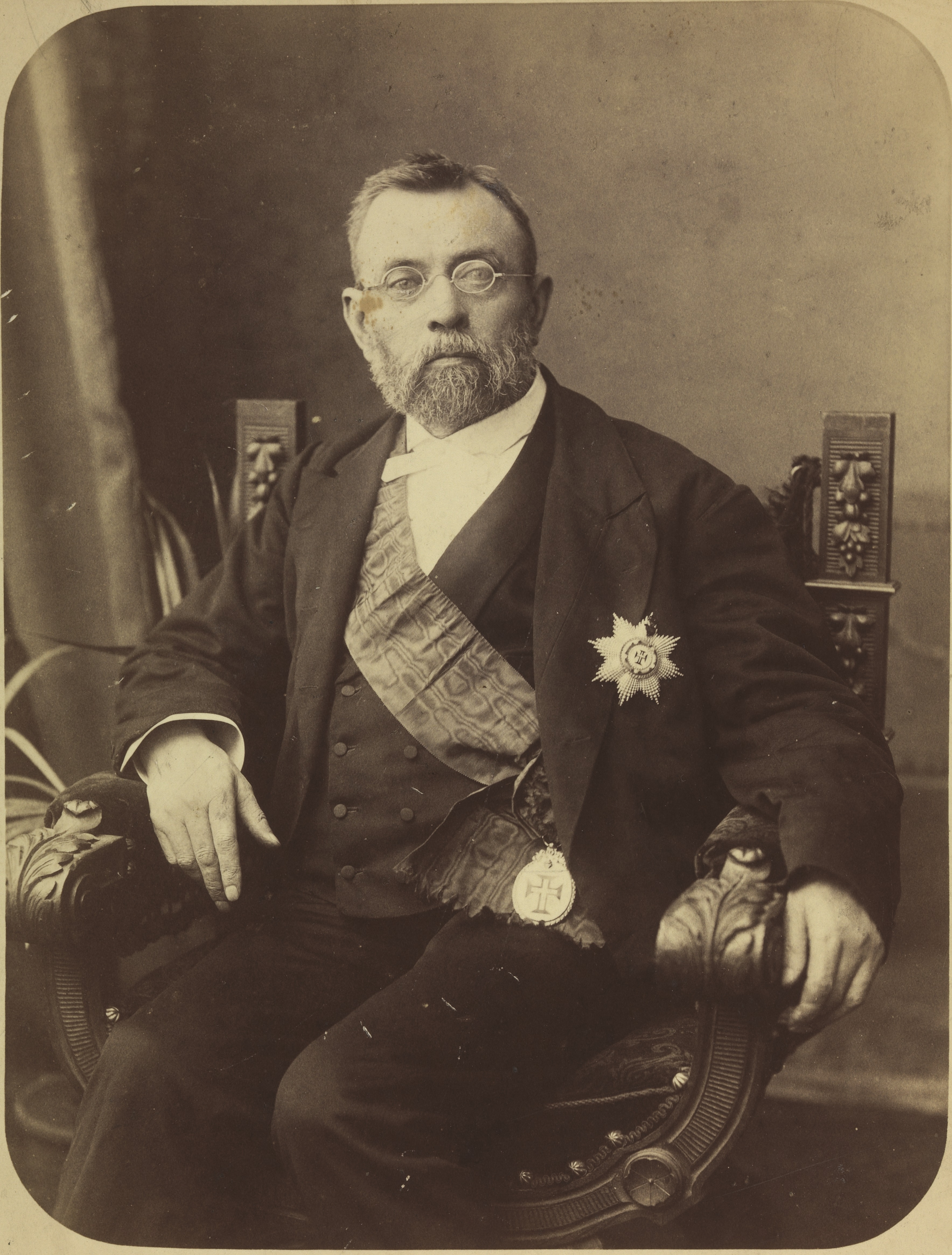 Baron von Mueller . Med dedikasjon. Depicted person: Mueller, Baron von Depicted place: Australia, Melbourne